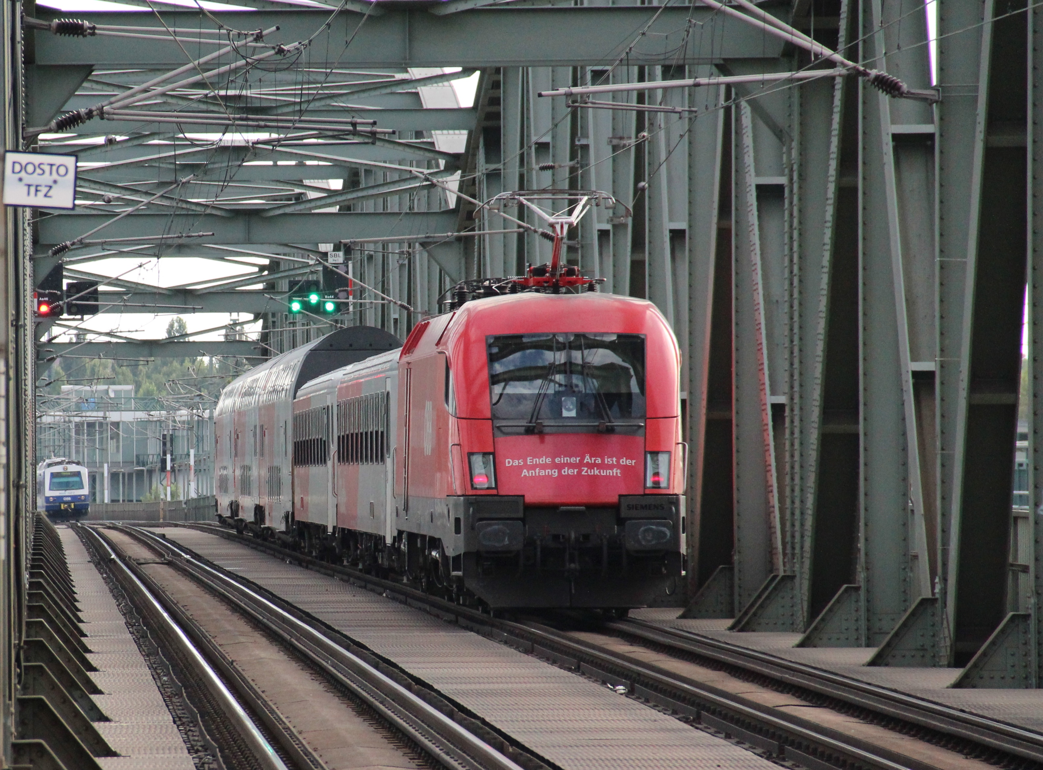 Die 1116.147 "Das Ende einer Ära ist der Anfang der Zukunft" (wurde anlässlich der Auflassung des Südbahnhofes angebracht) schiebt einen Regionalzug, der sowohl aus Doppelstock- als auch aus einstöckigen Wendezugwagen besteht, über die Donaubrücke der Schnellbahn-Stammstrecke bei Wien Handelskai.